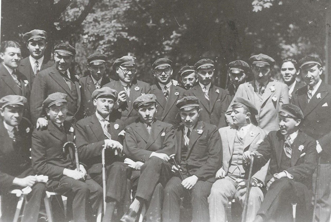 Mitglieder der Wiener Studentenverbindungen A.V. Kadimah und J.A.V. Maccabaea beim jährlichen Gang zu Theodor Herzls Grab auf dem Döblinger Friedhof. Die Träger der dunkleren Mützen sind Kadimahner.